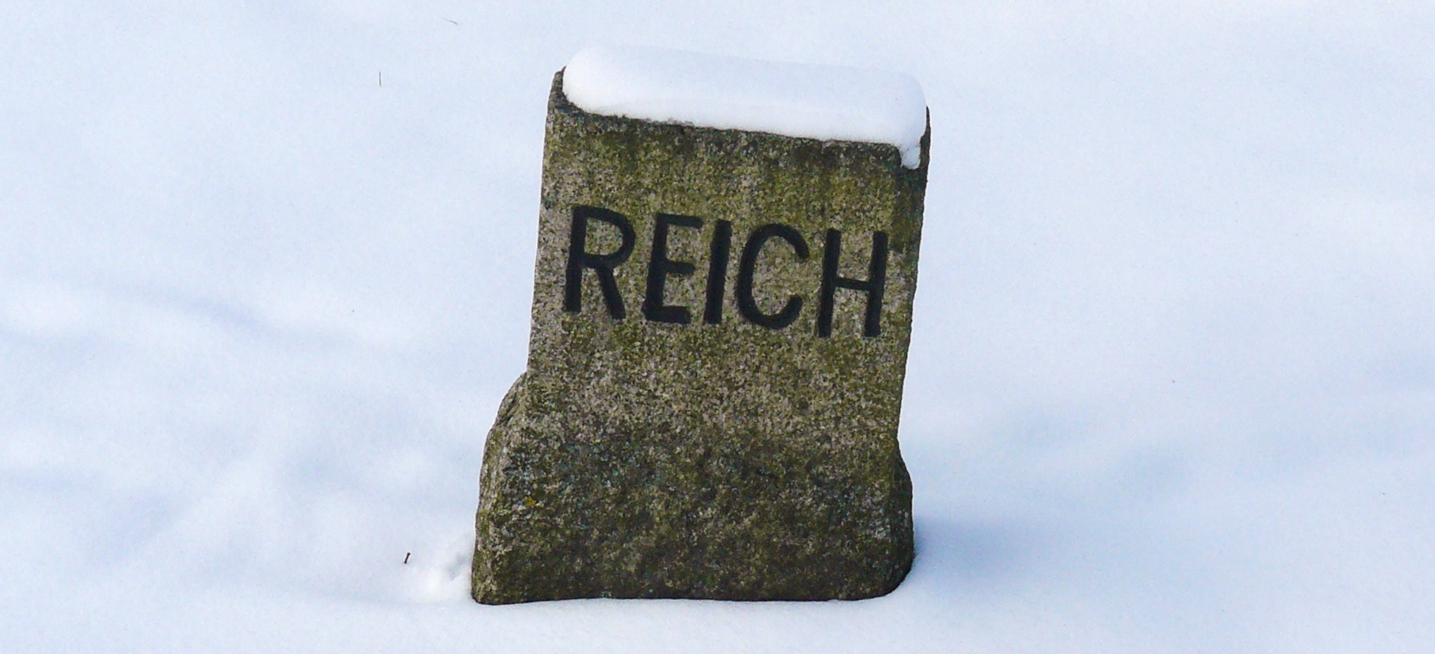 Park Drogowskazów i Słupów Milowych Cywilizacji - Witnica.